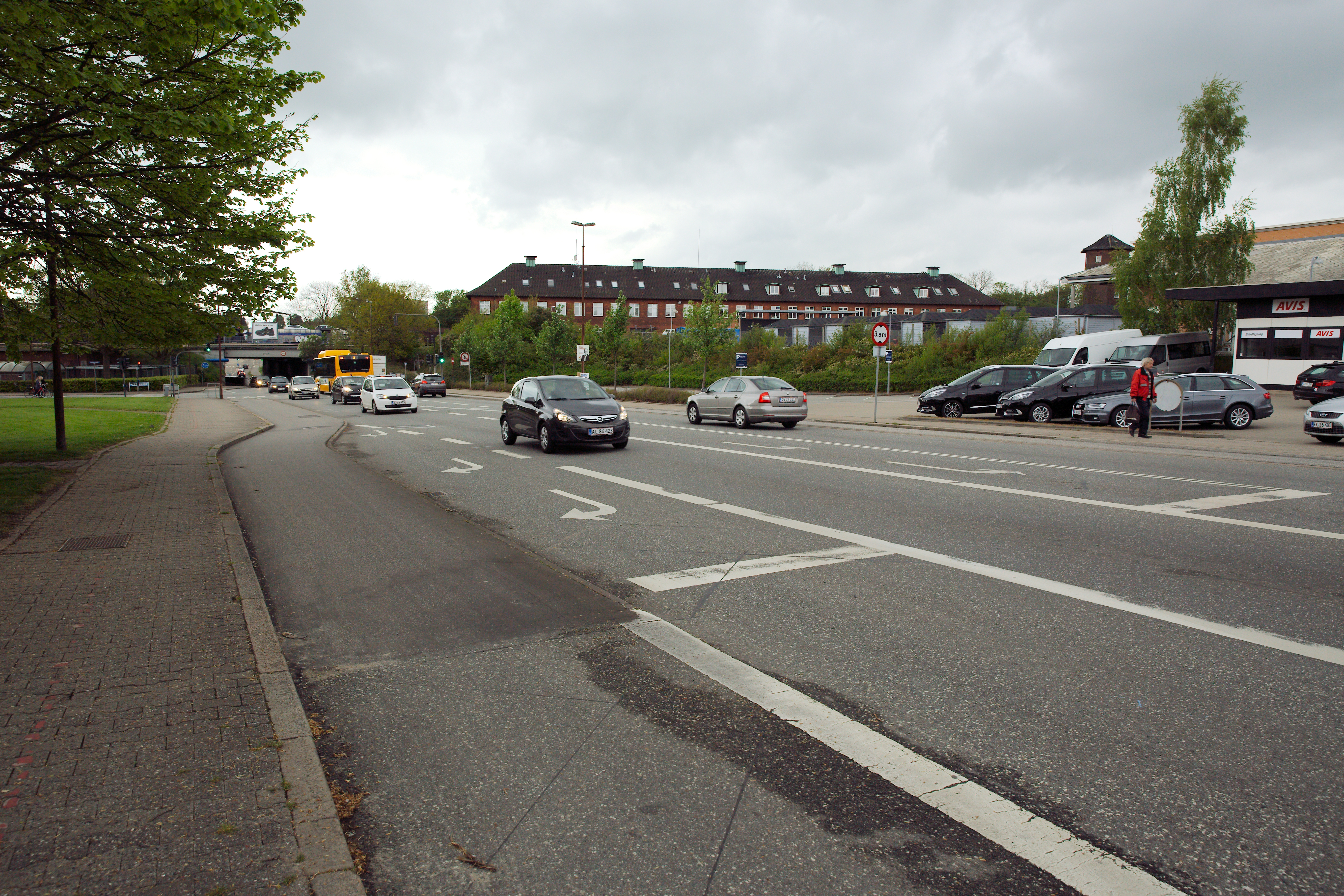 Vejlevej i Fredericia